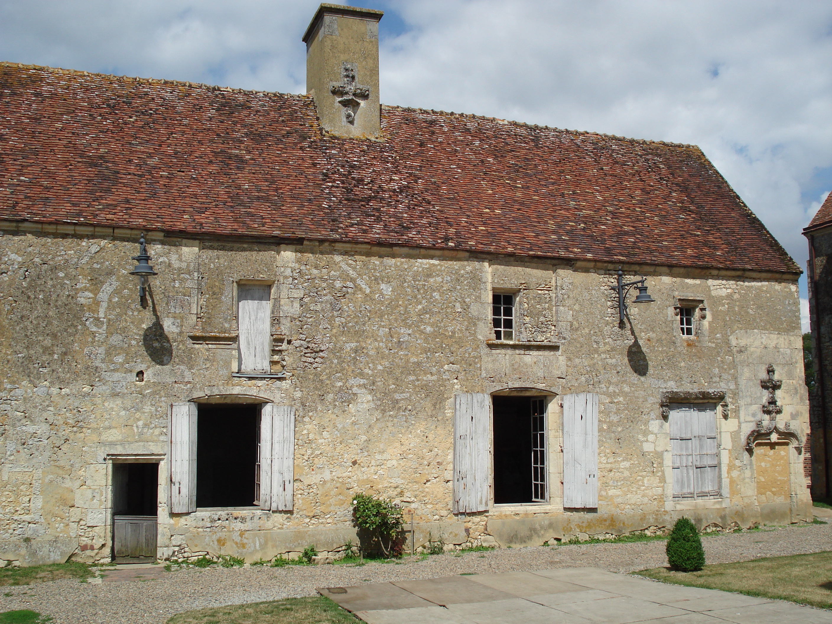 Logis du Prieur - Prieuré de Sainte-Gauburge - Saint-Cyr-la-Rosière - Sarthe (72)